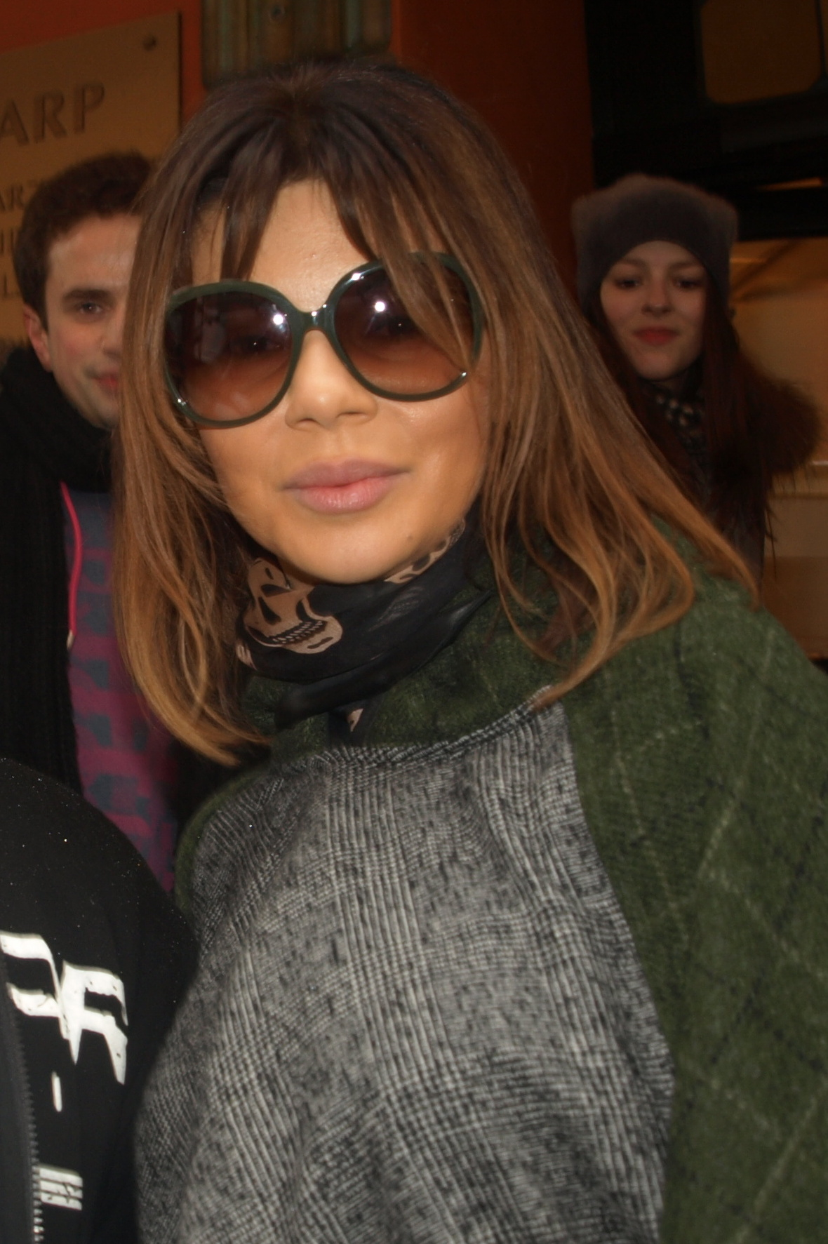 Edyta Górniak w 2010 roku